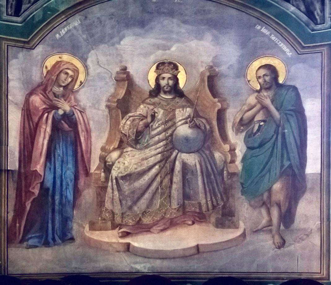 Nicolae Grigorescu - Mănăstirea Zamfira - Deisis